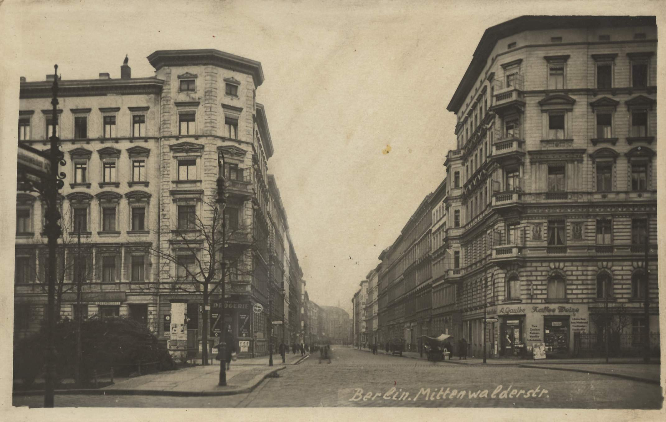 Blick von der Gneisenaustraße in die Mittenwalder Straße in Berlin-Kreuzberg